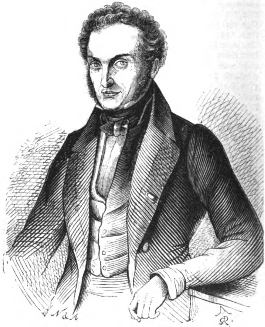 Franz Anton Regenauer, badischer Politiker und Abgeordneter der 2. Kammer, 1845, später auch Finanzminister des Großherzogtums Baden.